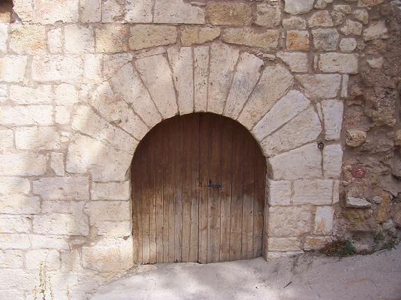 Puerta de la herrería, en la iglesia parroquial de Castielfabib, provincia de Valencia.